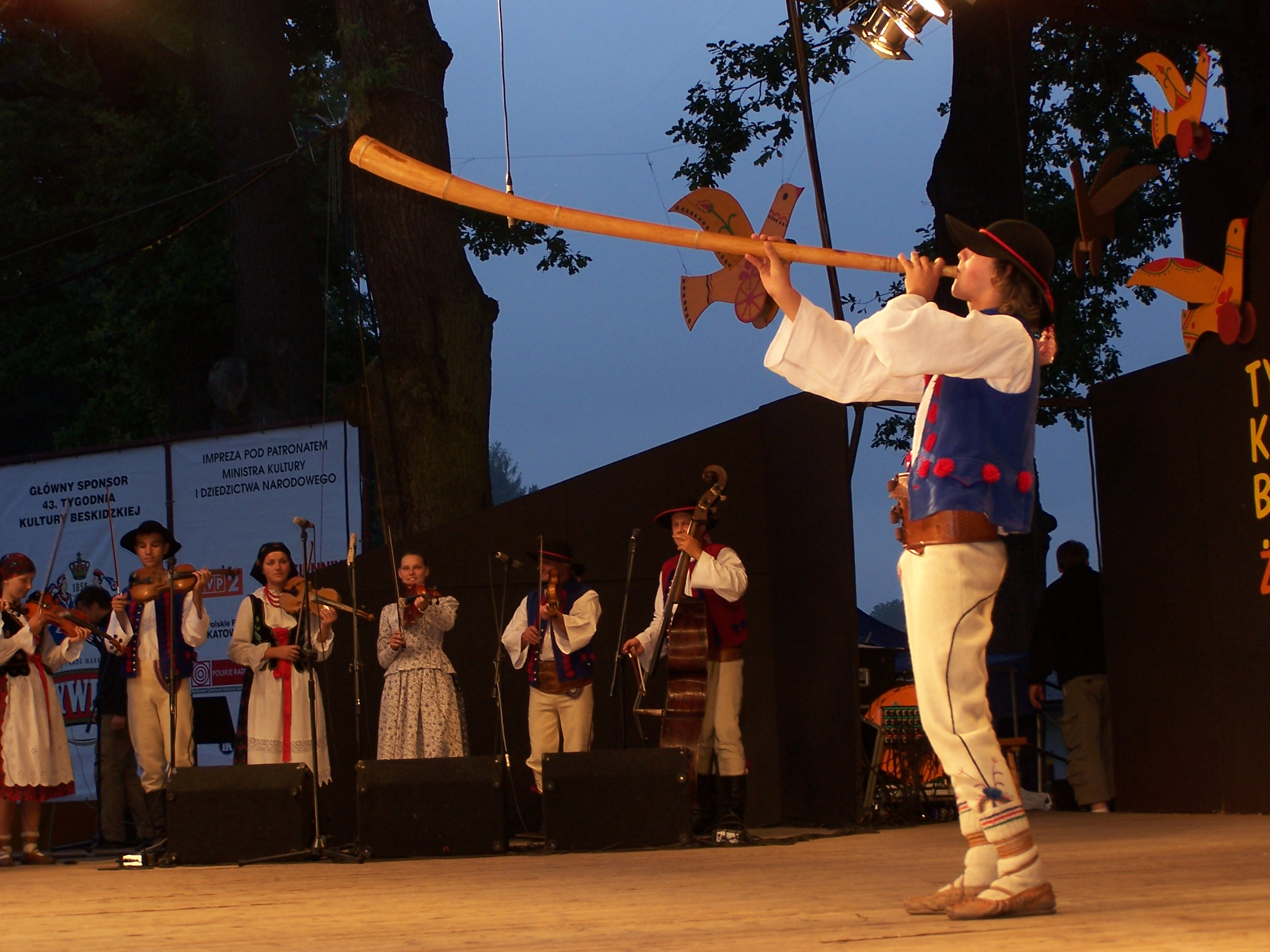 Występ zespołu Żywczanie z Żywca podczas 43. Tygodnia Kultury Beskidzkiej w Żywcu.